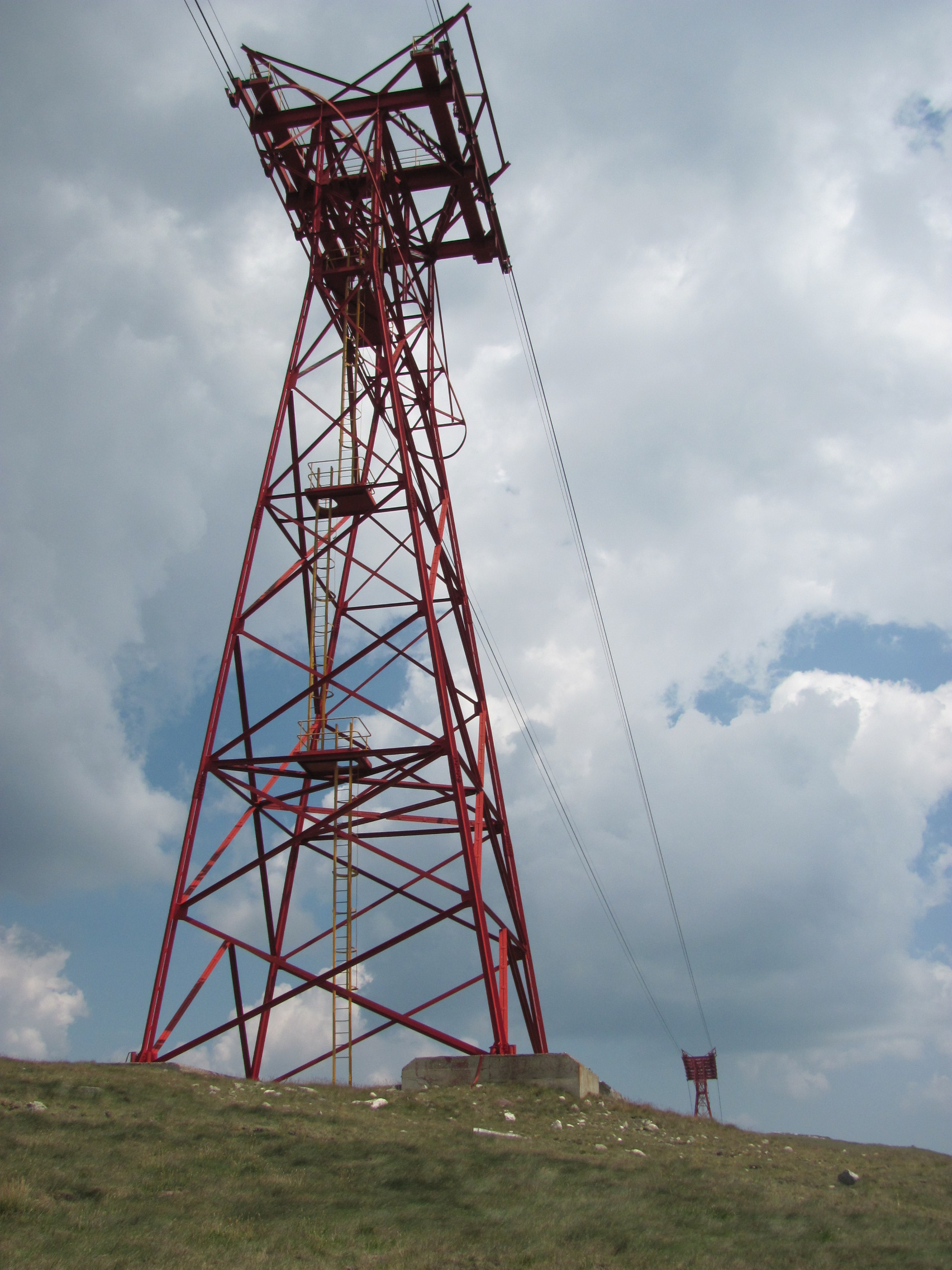 Stâlpul 6 al telecabinei Bușteni-Babele de pe platoul Bucegi (15 Aug 2010)